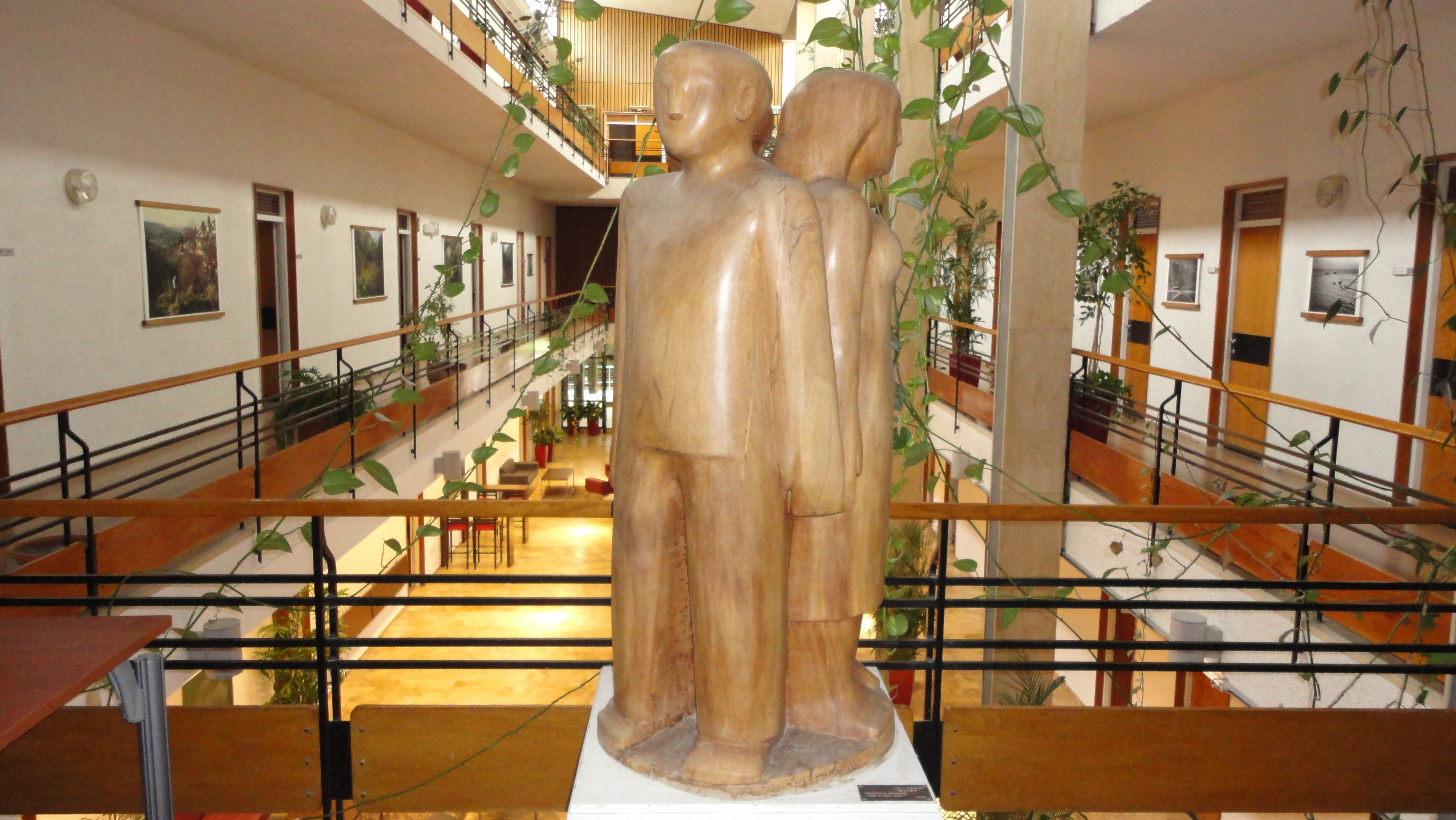 Sculpture